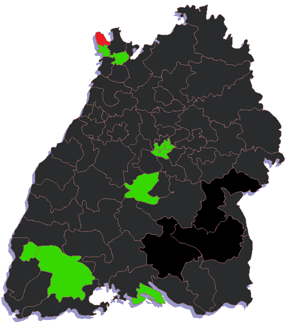 Landtagswahl Baden-Württemberg 2011: Wahlkreisergebnisse